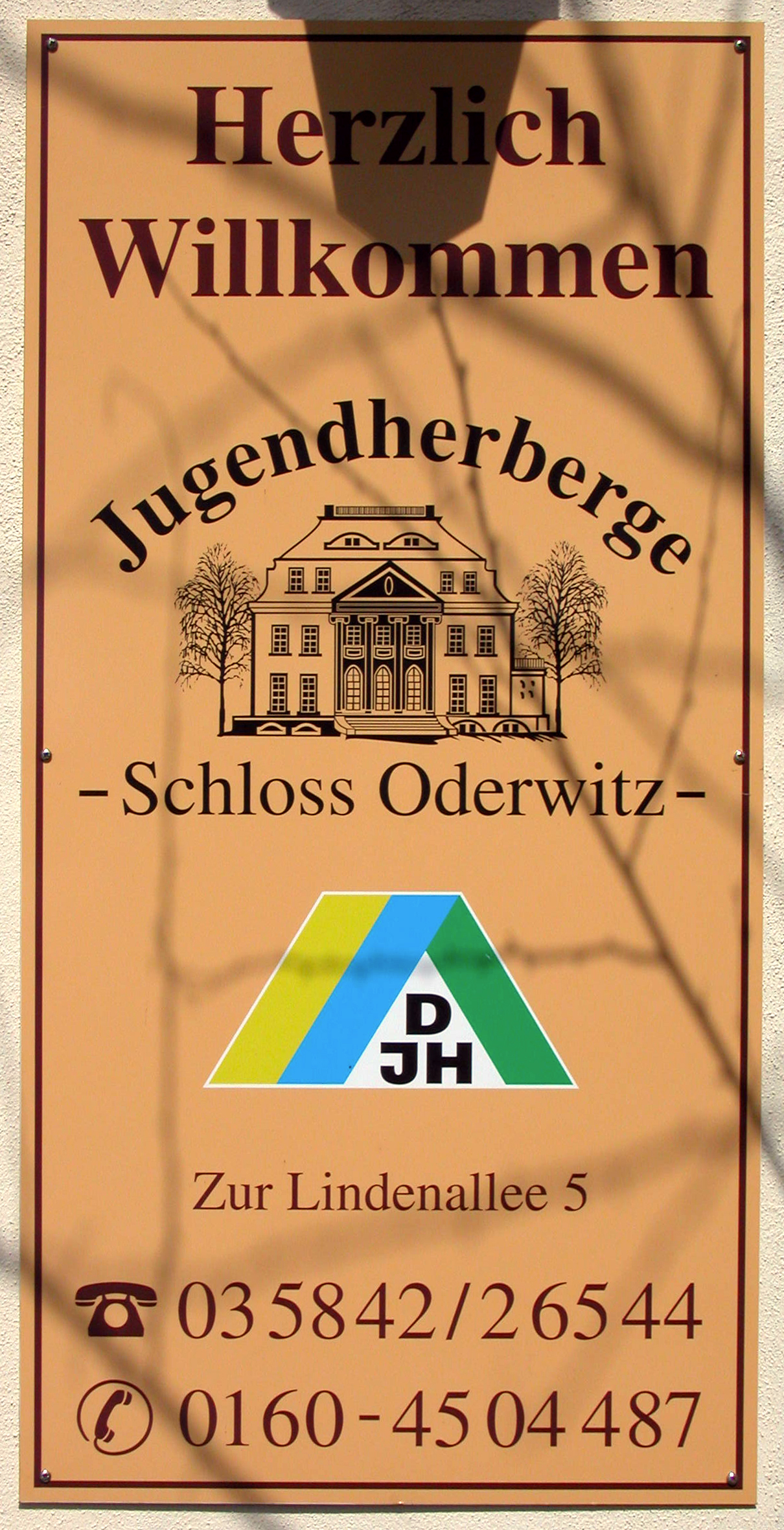 28.04.2008 02791 Oberoderwitz (Oderwitz), Zur Lindenallee 5: Schloß Oberoderwitz, erbaut 1909 bis 1911 unter Maximilian von Beschwitz. Bis 2012 Jugendherberge, danach Privatbesitz. GMP: 50.968413,14.716150). Hausschild [DSCN32507.TIF]20080428380DR.JPG(c)Blobelt